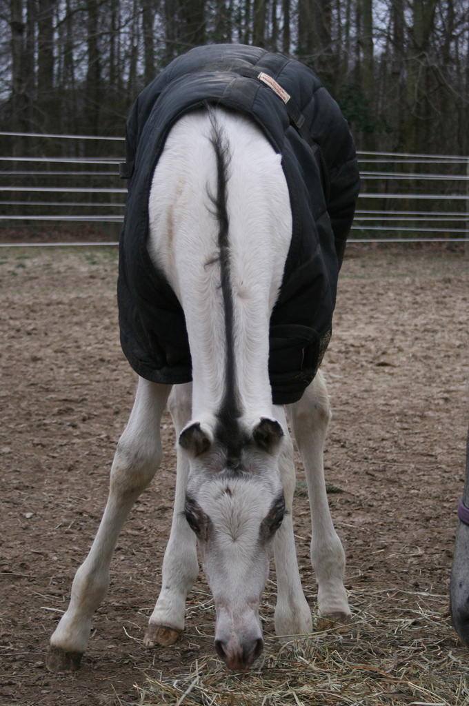 Little Appaloosa foal grazing